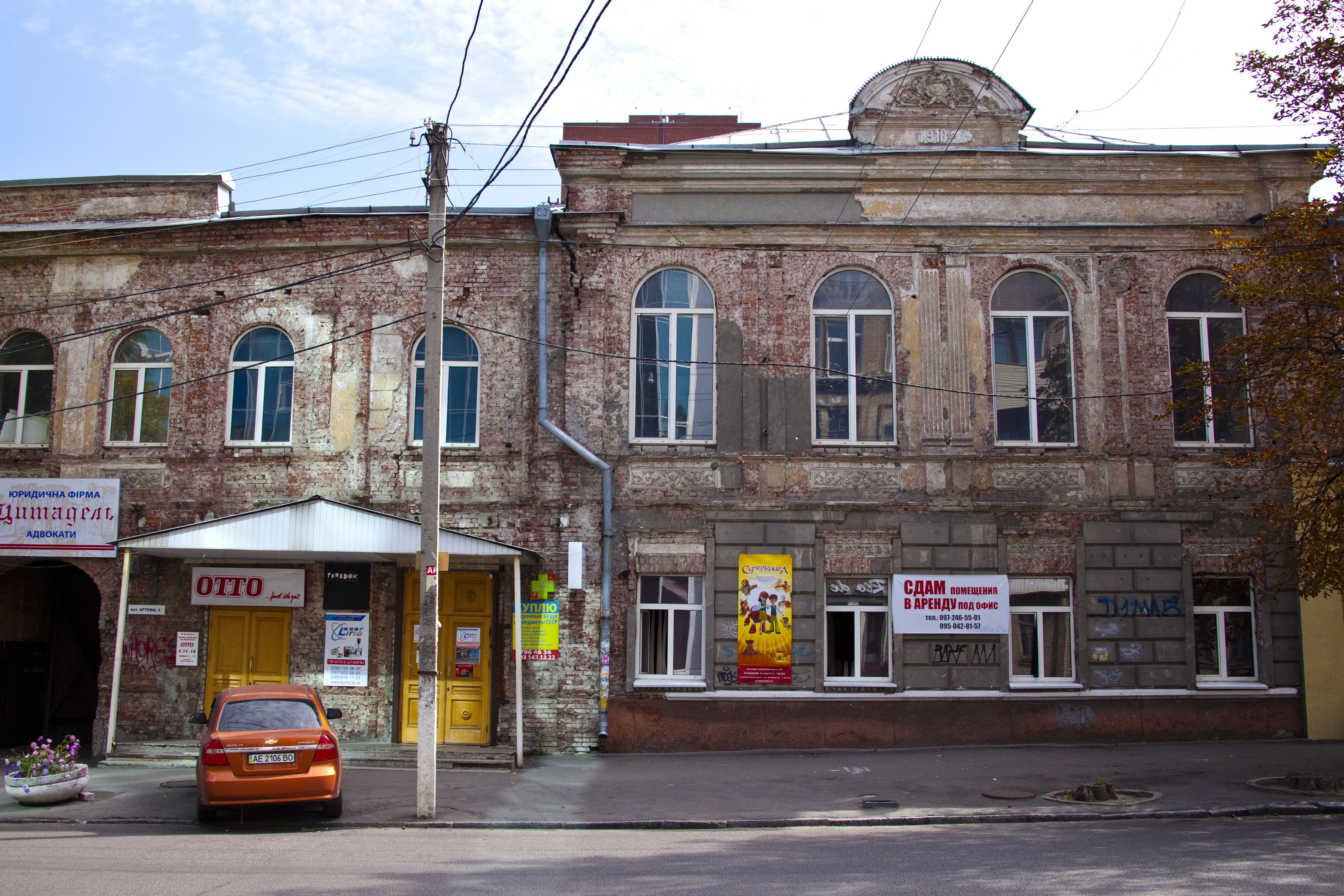 Будинок Катеринославської повітової земської управи, Дніпропетровськ, Артема вул., 3